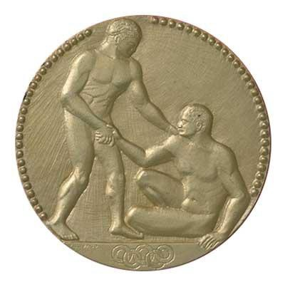 Médaille d'argent JO 1924 – Avers